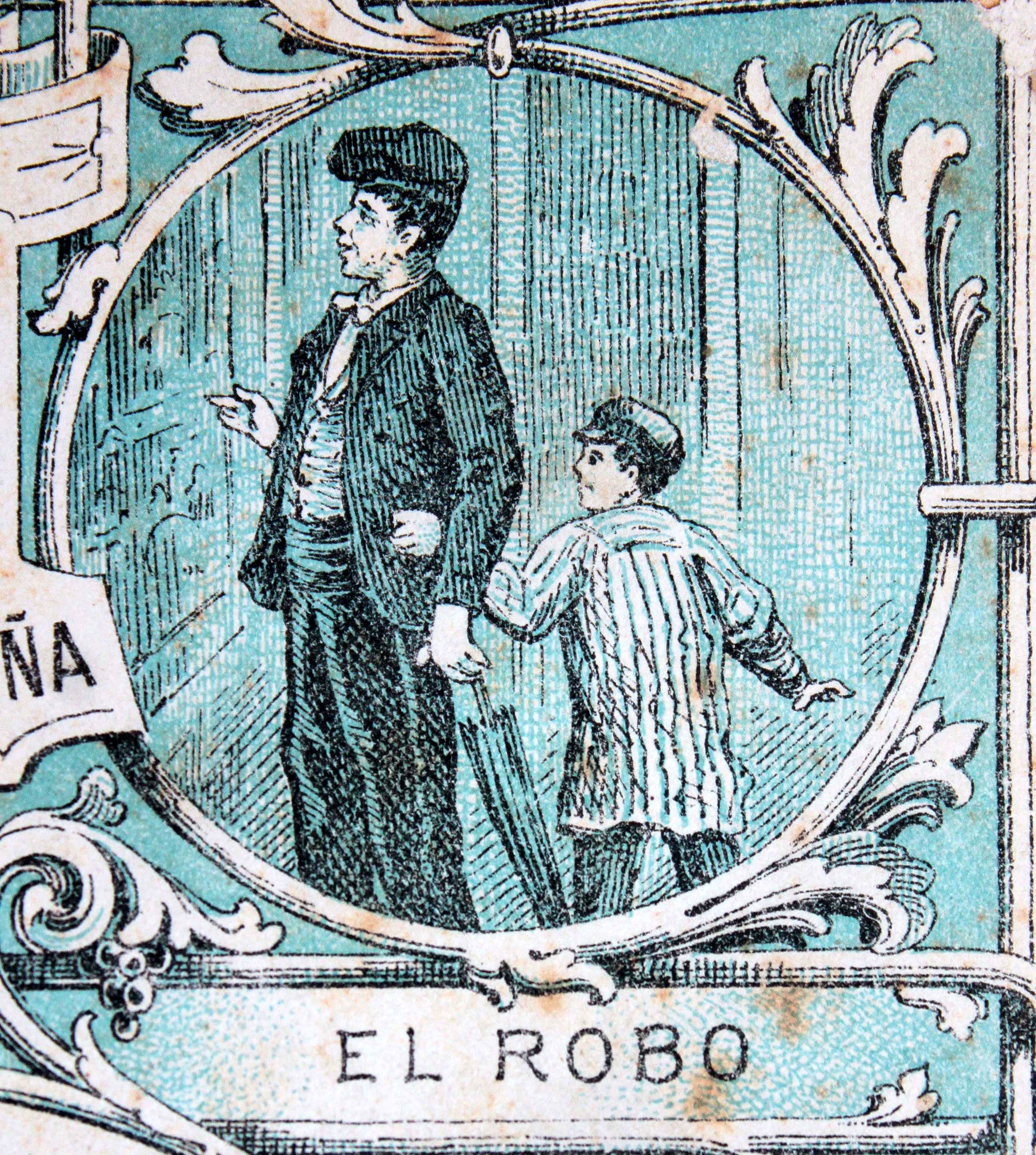 Ilustraciones de la obra : La criminalidad en Barcelona y en las grandes poblaciones / por Manuel Gil Maestre. - Barcelona : Tipografía de Leodegardo Obradors, 1886